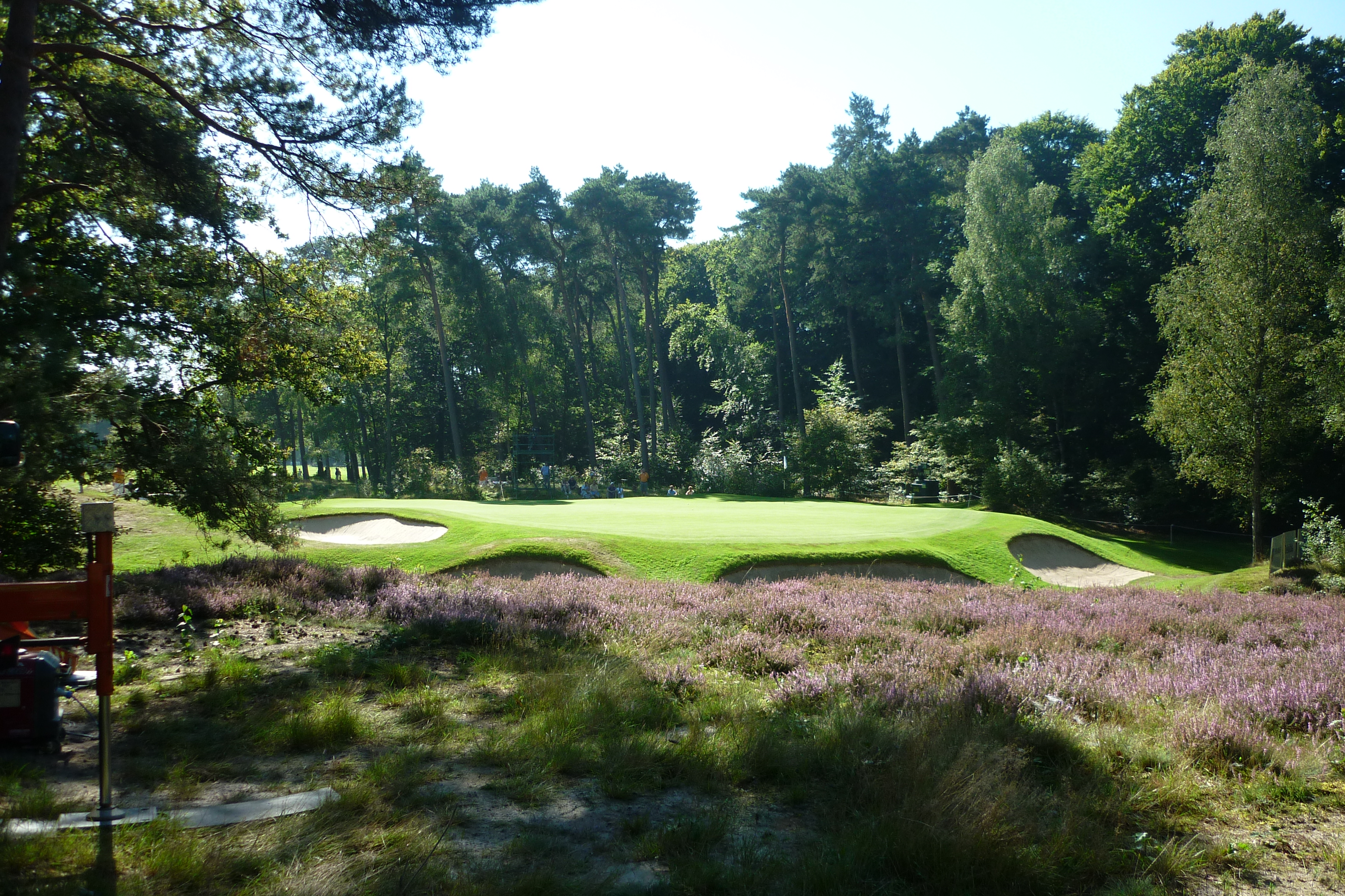 Hilversumsche Golf Club, hole 14 (tijdens KLM Open hole 5)